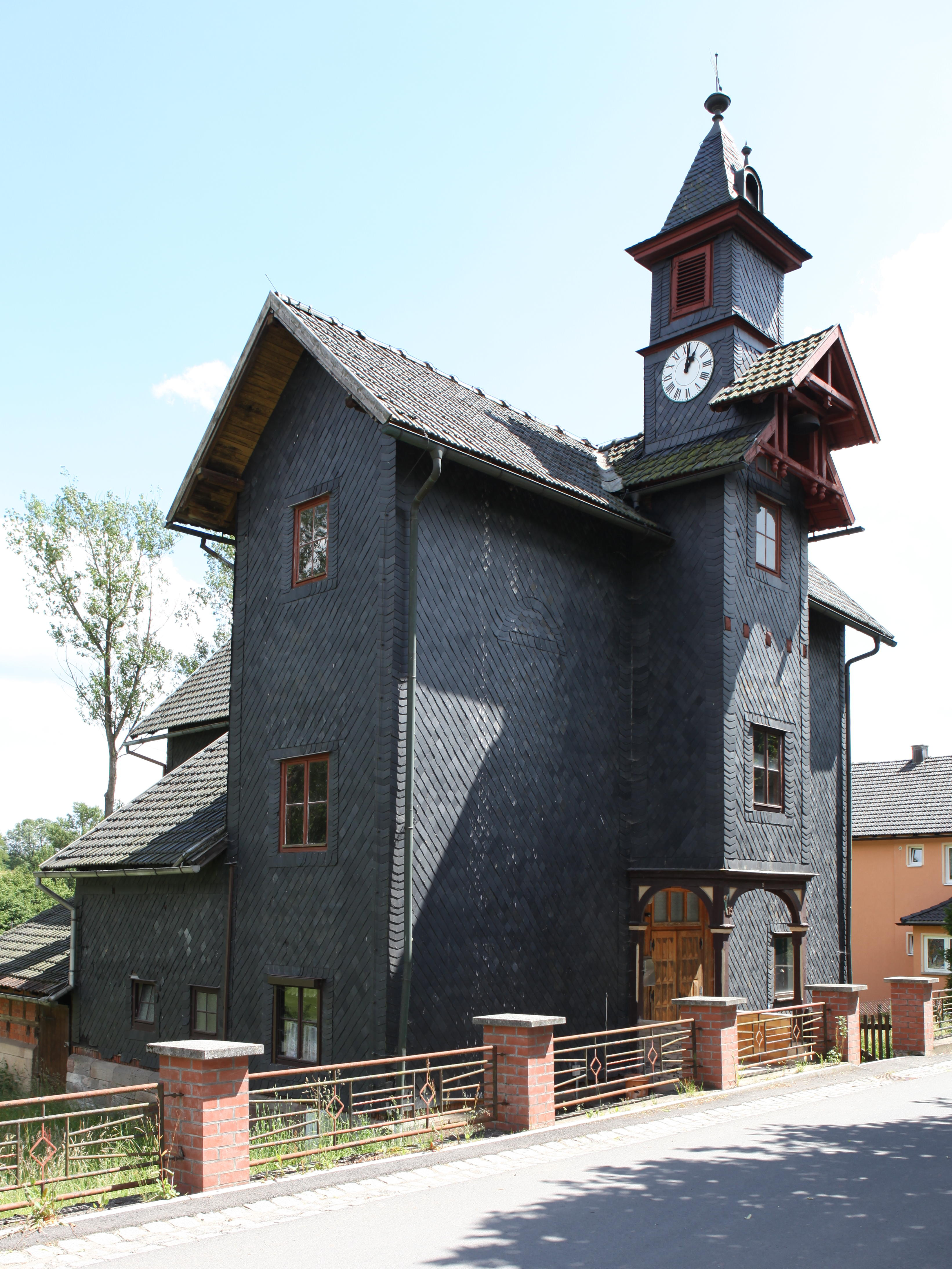 Ehemalige Schule in Seltendorf, OT von Frankenblick, im Landkreis Sonneberg